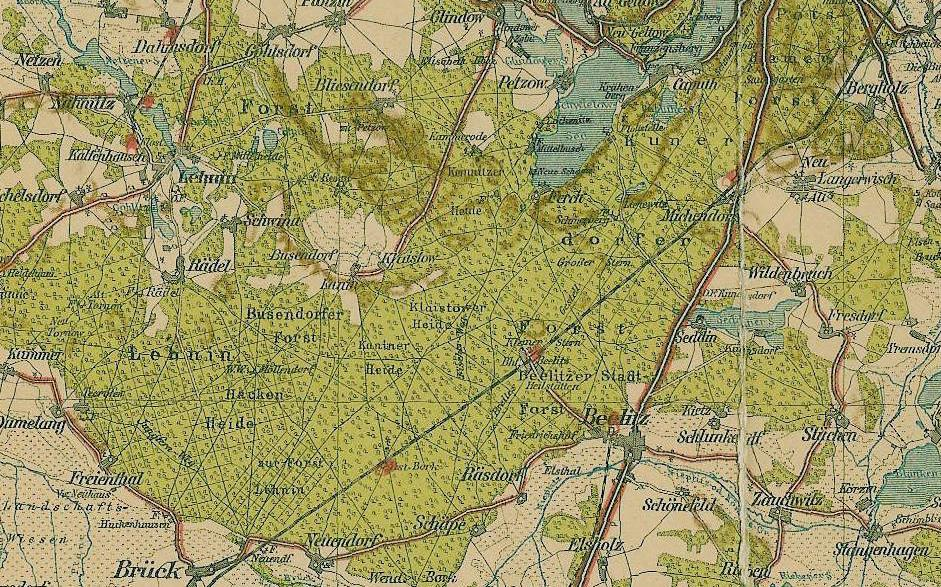 Karte Zauche um 1903 Ausschnitt aus: Historische Karte von Brandenburg 1903 zwischen Treuenbrietzen und Teltow; im Besitz von Acf. Gesamtkarte: [Bild:Karte.Treuenbrietzen.Teltow.1903.jpg] oder bei Benutzer:Acf Bearbeitet --Lienhard Schulz 17:42, 6. Sep 2004 (CEST) Digitalbearbeitung Acf 2004; Public Domain